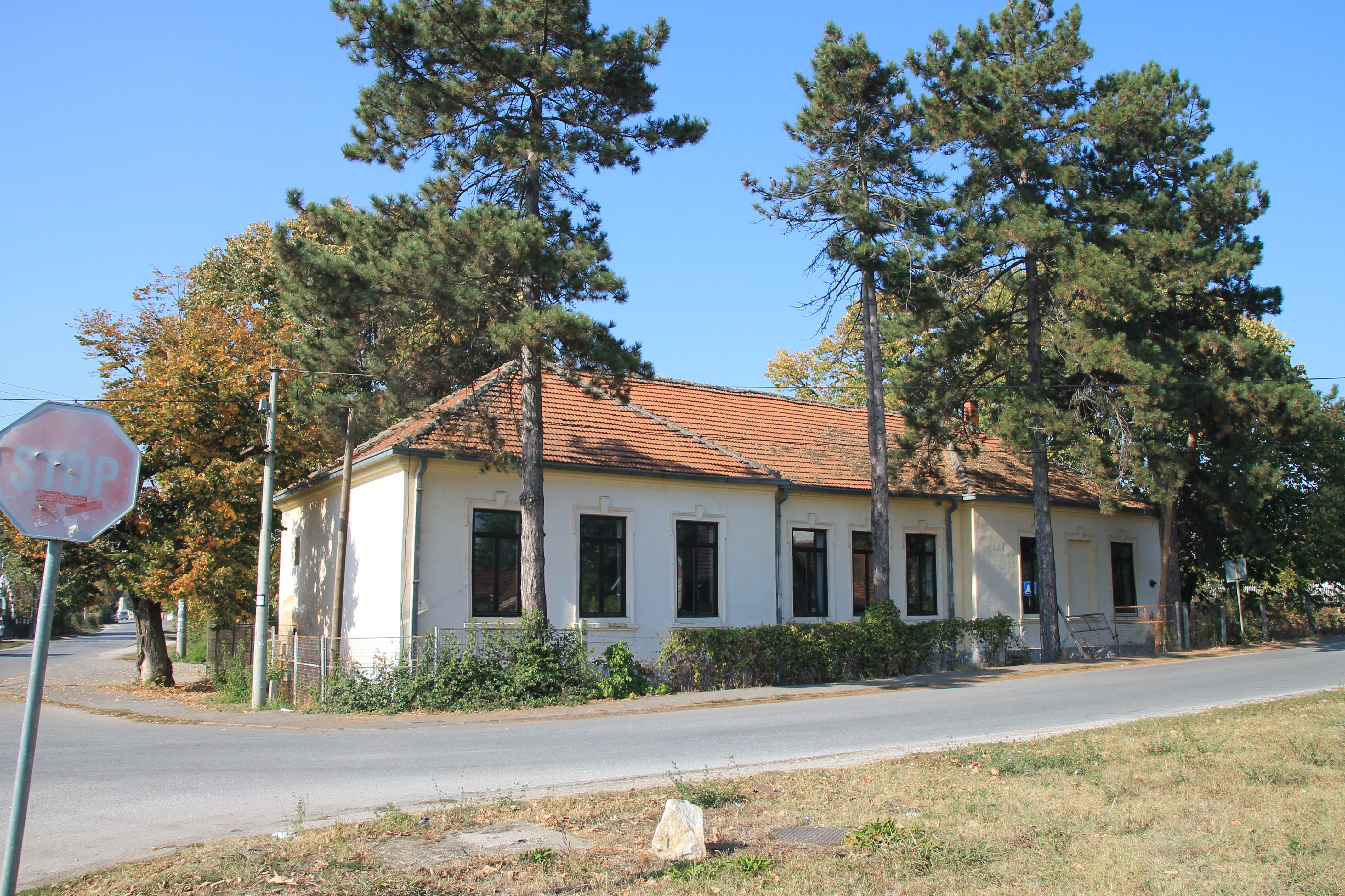 Vinorača